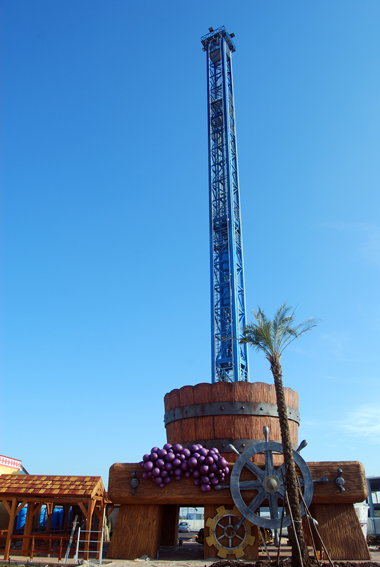 Per Bacco, attrazione adrenalinica: torre di caduta alta 47 metri